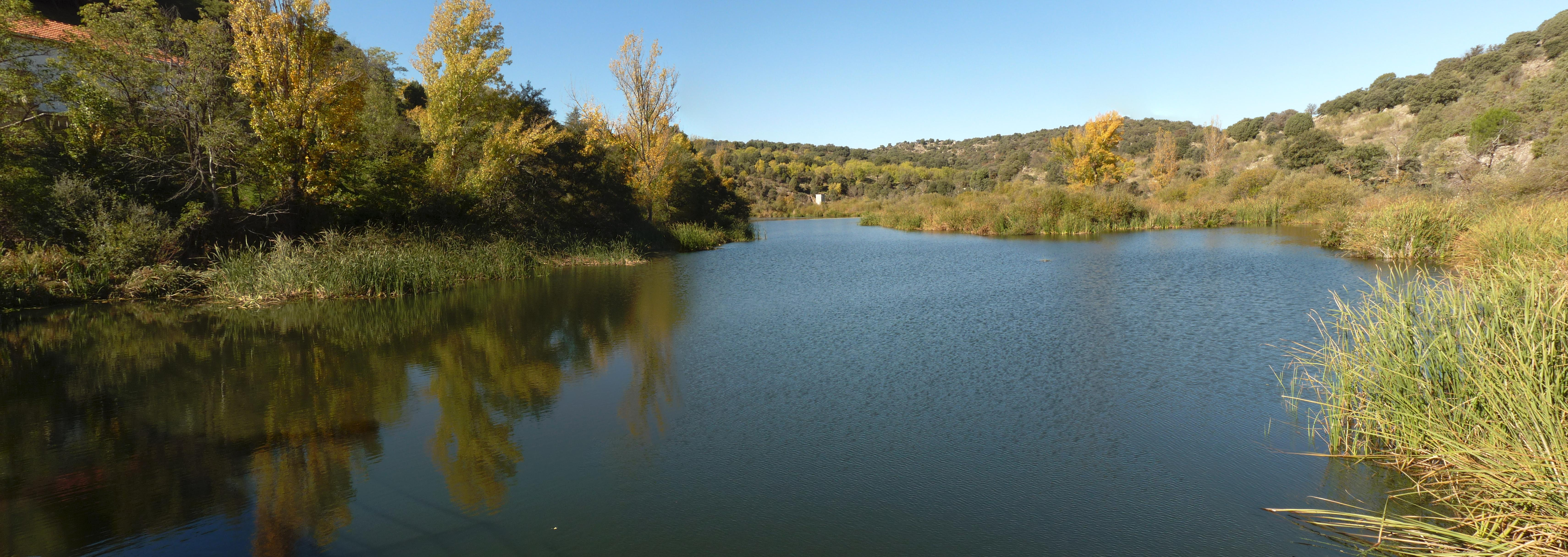 Presa Vieja